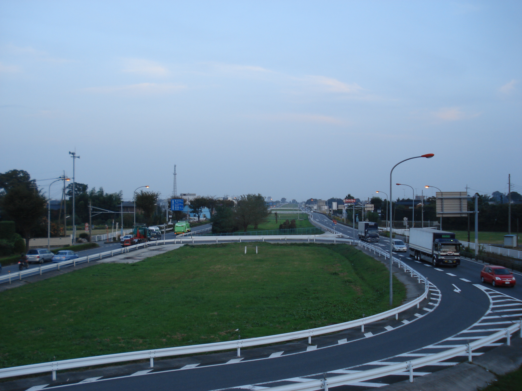 国道17号 熊谷バイパス 埼玉県行田市 下忍交差点